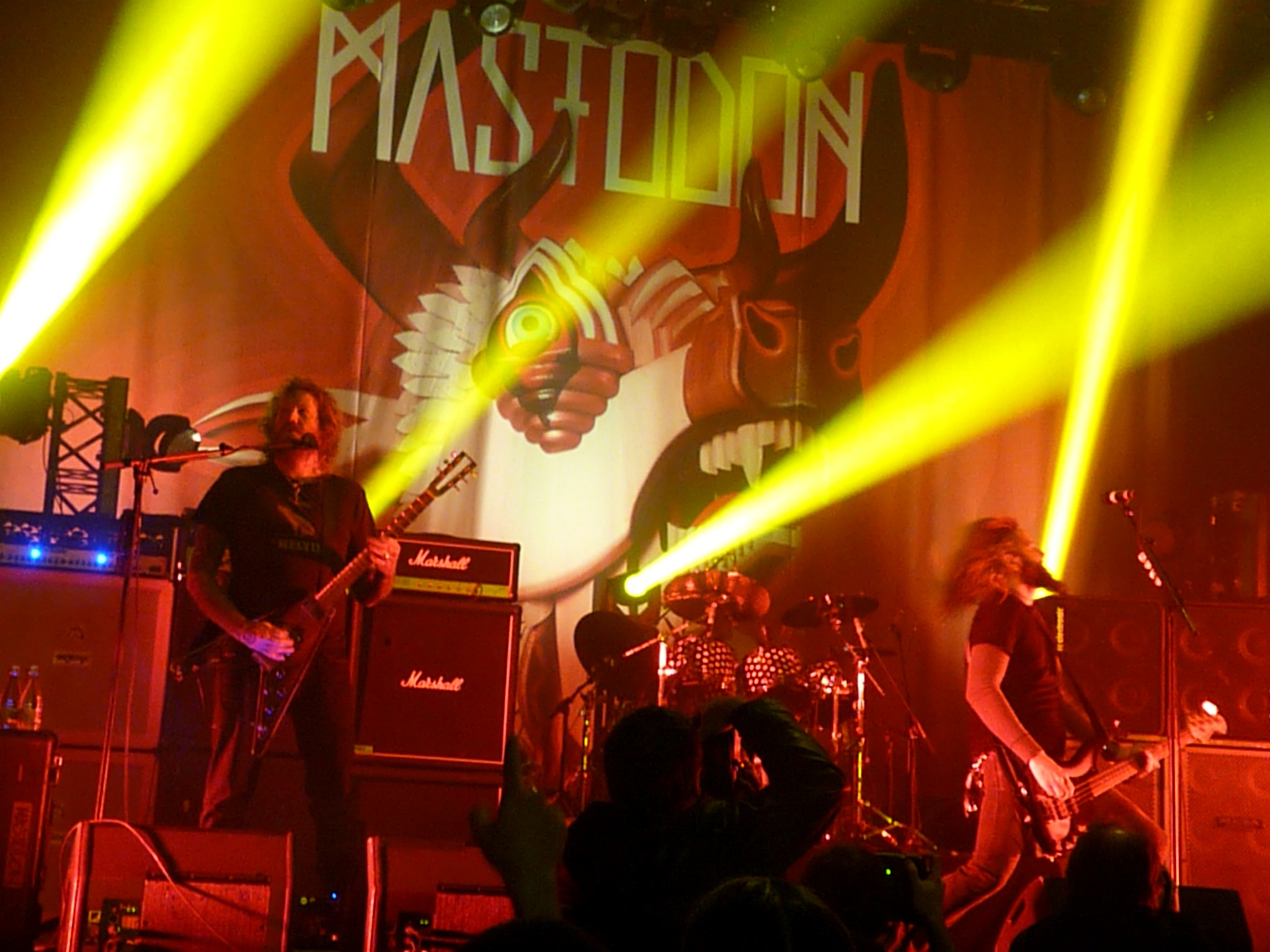 Mastodon actuando en la sala Razzmatazz (Barcelona) en 2012.